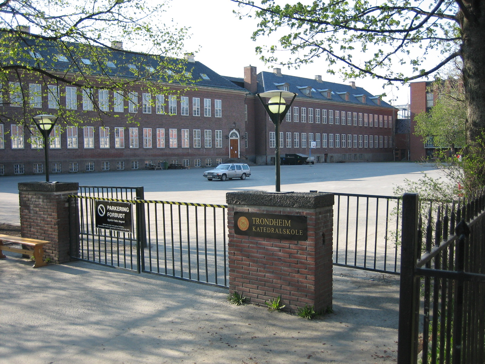 Trondheim Katedralskole, view from Bispegata.